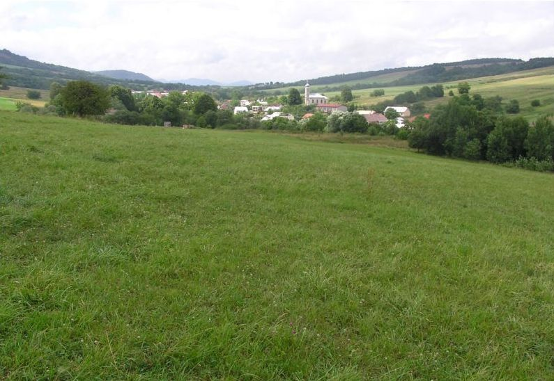 Celkový pohľad